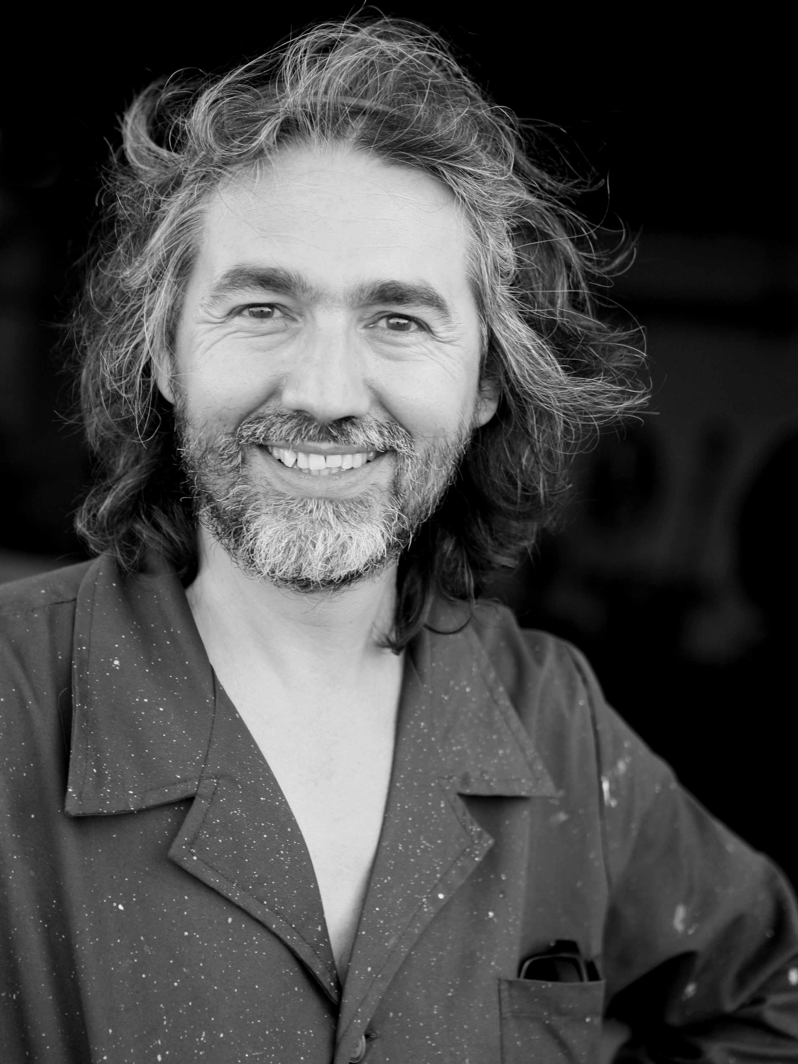 Retrato de Teo San José